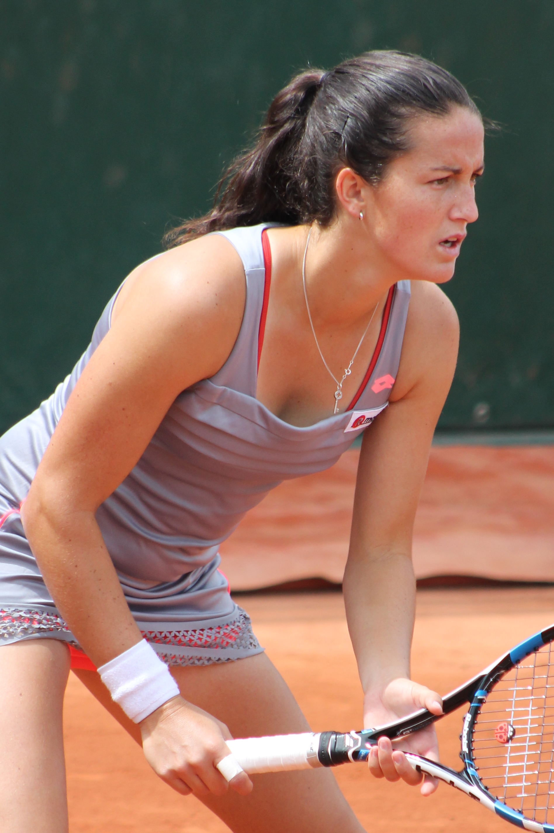 Arruabarrena RG15 (20)